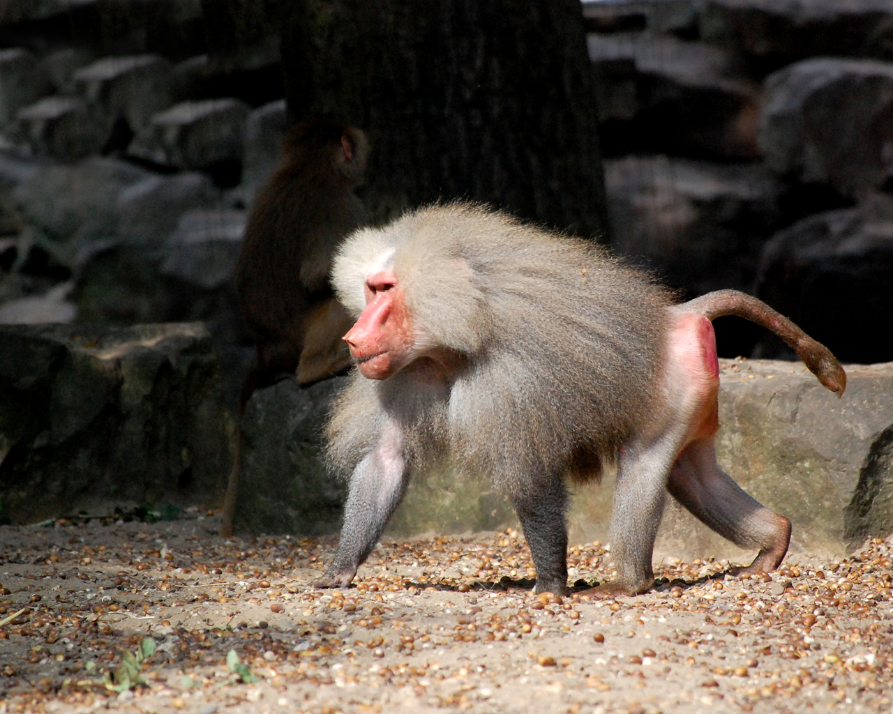 Baviaan te Dierenpark Emmen